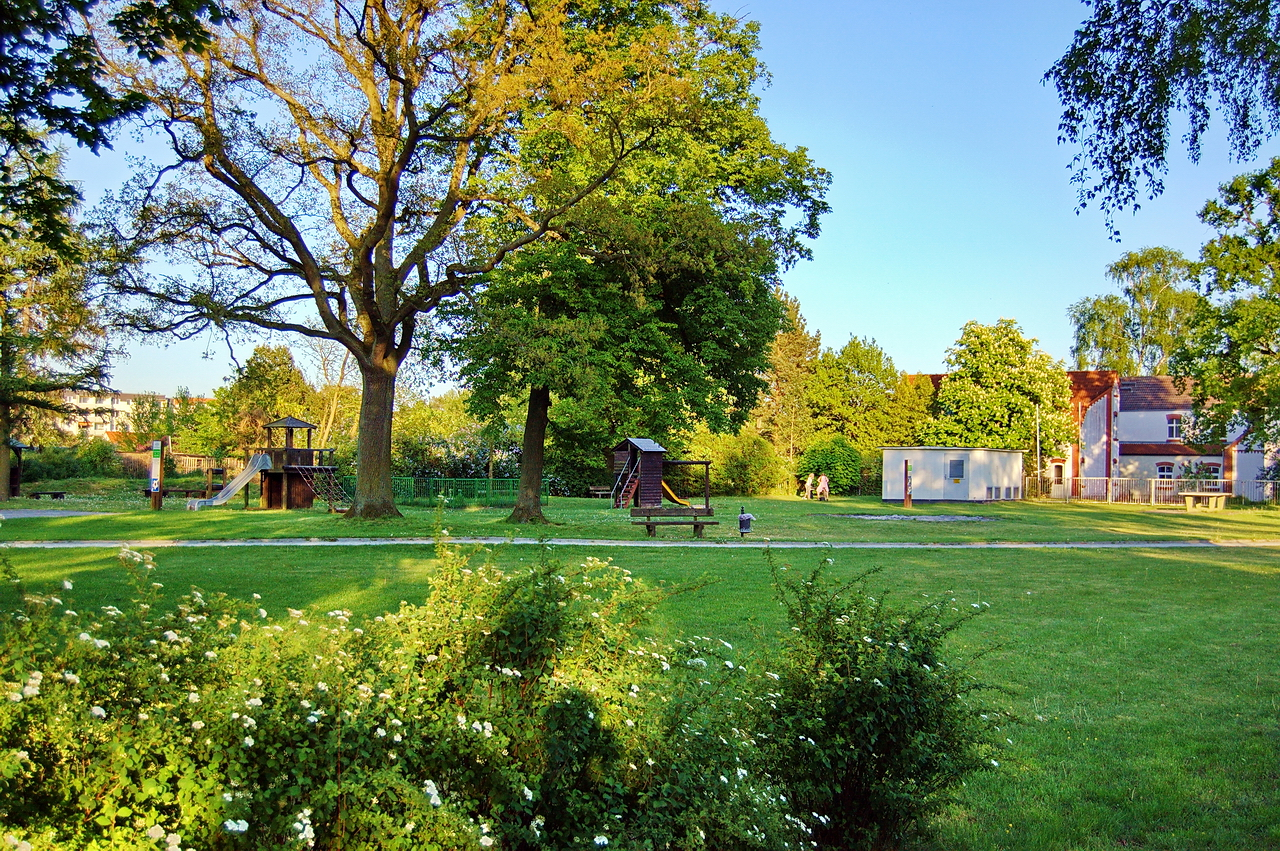 Bleiche (heute Festplatz) in Gelbensande